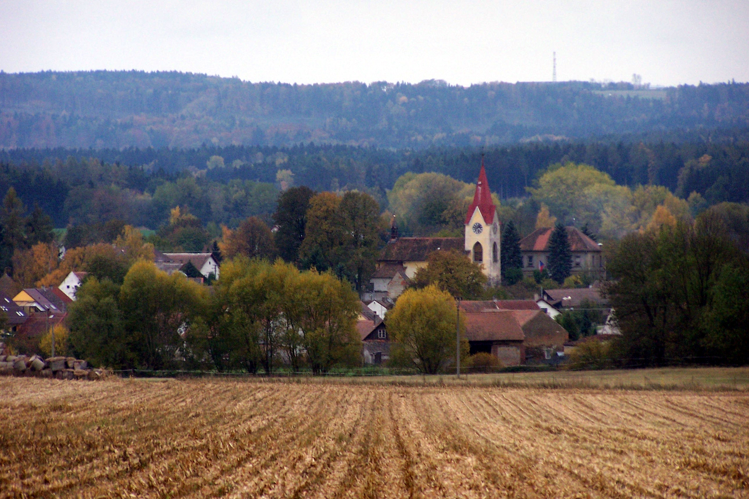 Stojice z červené stezky spojující Svojšice a Horní Raškovice. GPS: 49°57'57.696"N, 15°37'2.325"E